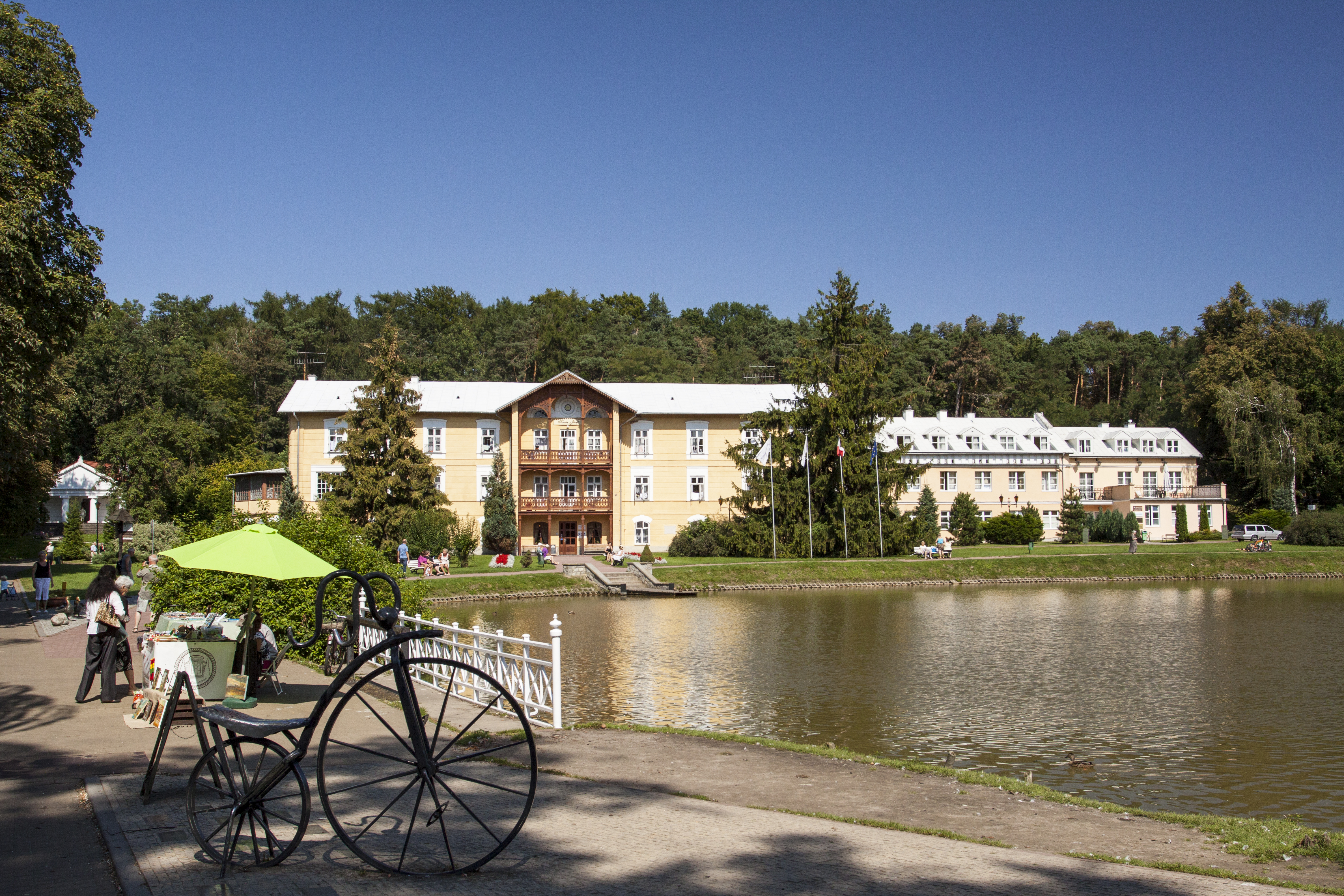 zespół pałacowo-zdrojowy sanatorium Nałęczów, Nałęczów 03.1967.